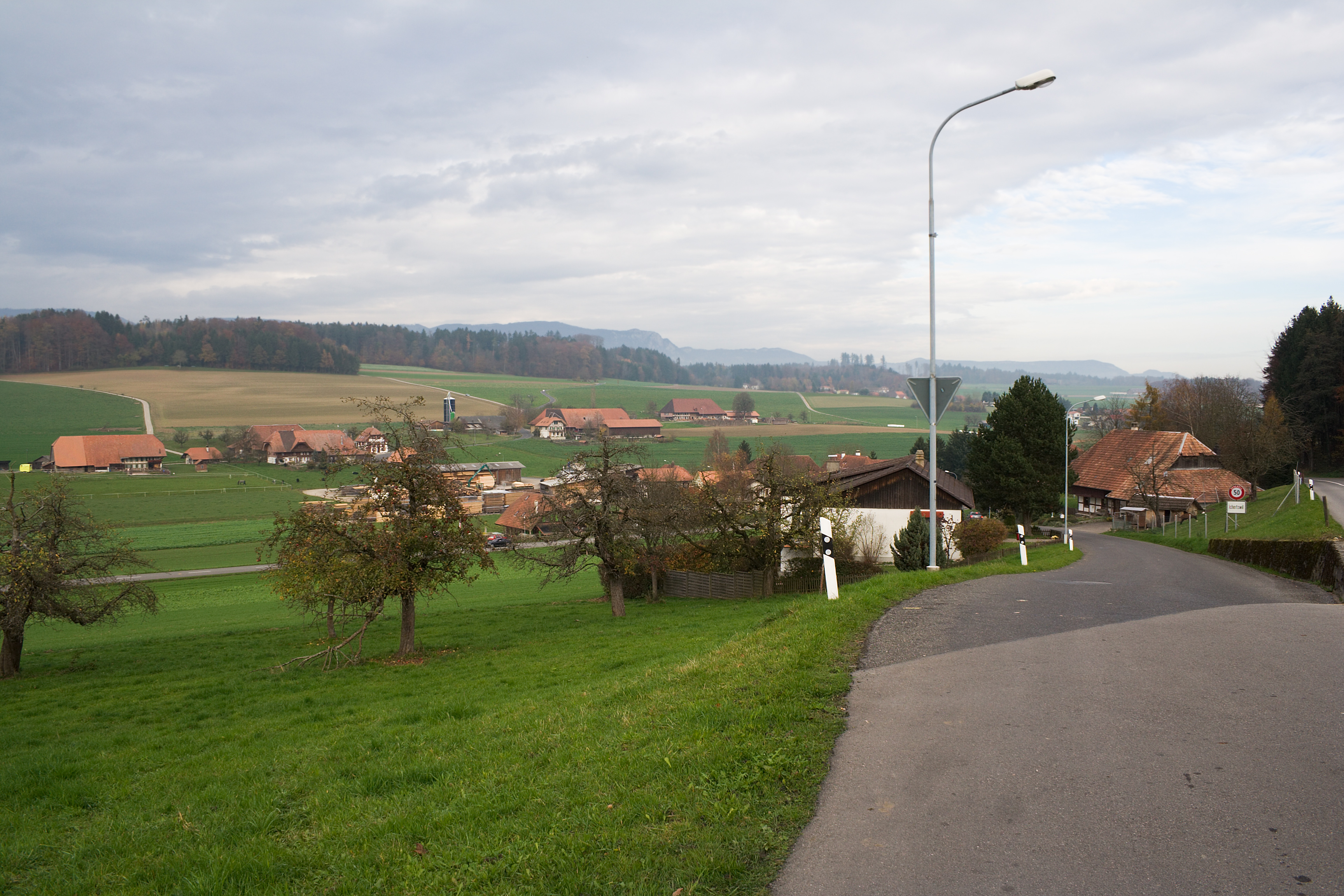 Ichertswil, eine lose Siedlung im Kanton Solothurn, Schweiz